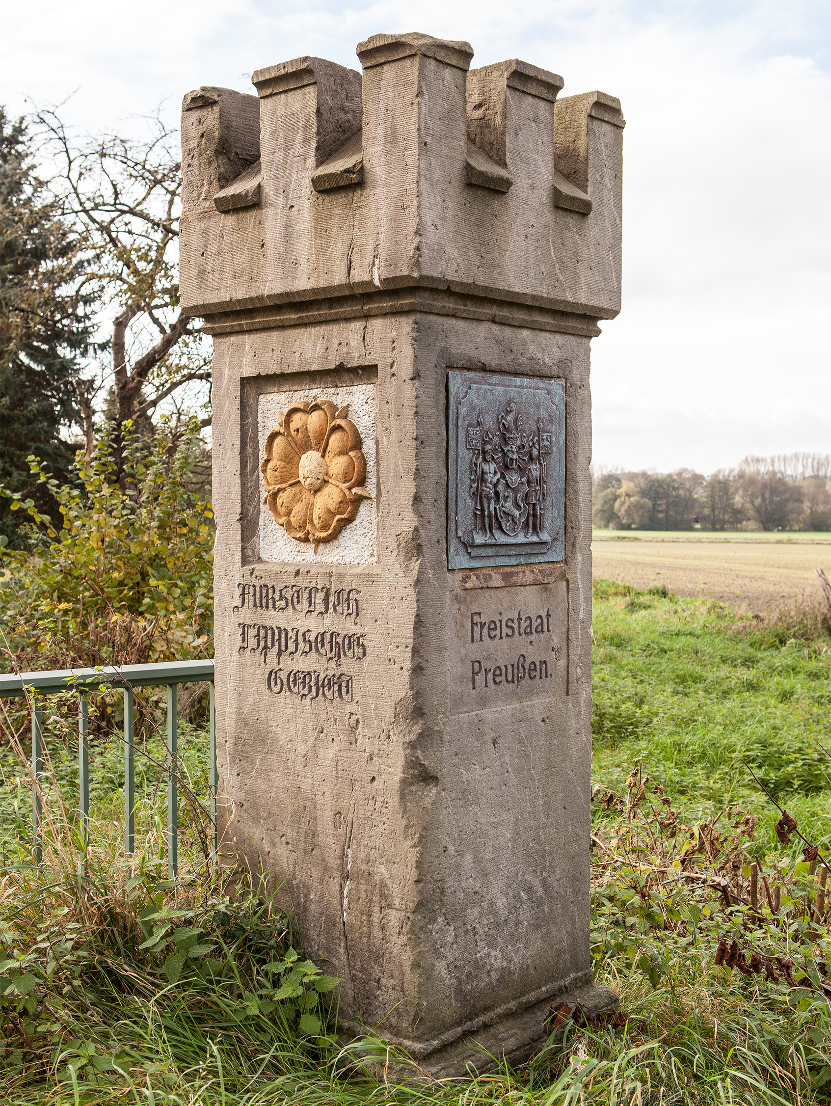 Grenzstein zwischen dem "Fürstentum Lippe" und dem "Freistaat Preußen", heute zwischen Bad Salzuflen (Kreis Lippe) und Herford (Kreis Herford) in Nordrhein-Westfalen an der Herforder Straße / Salzufler Straße. This is a photograph of an architectural monument. This is a photograph of an architectural monument.